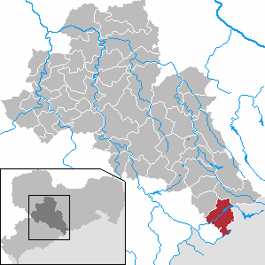 Neuhausen/Erzgeb. in Saxony - district Mittelsachsen